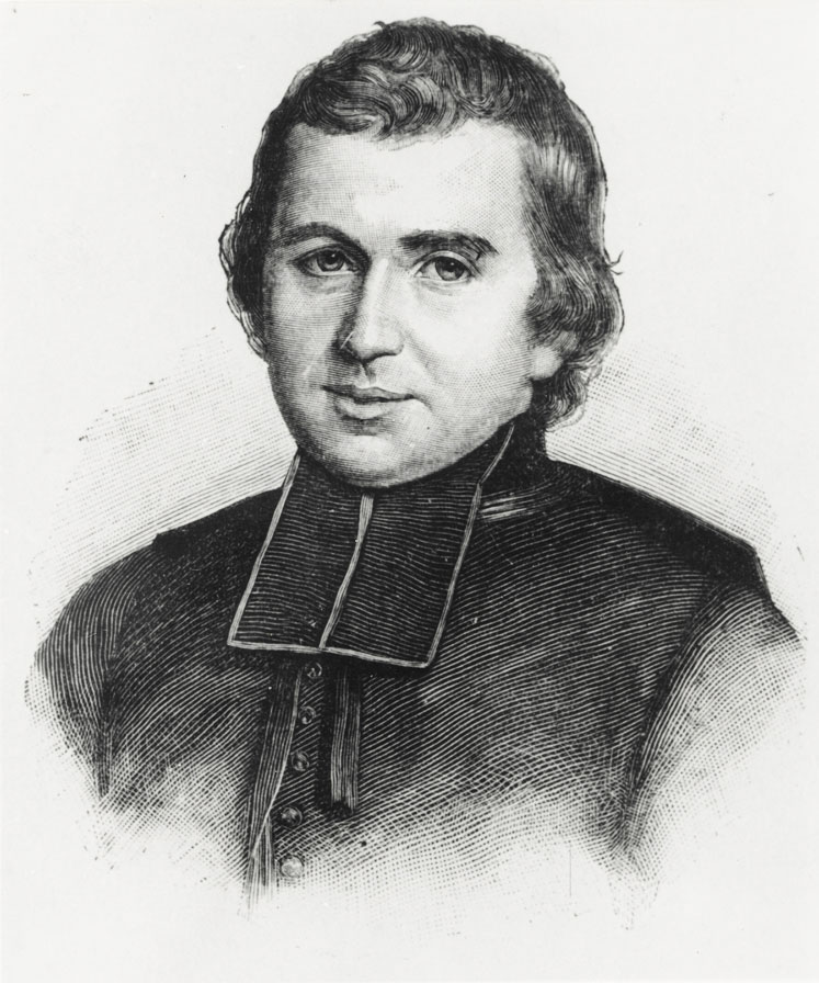 François d'Assise Caret (14 juillet 1802–1844). Pionnier du catholicisme en Polynésie, ce missionnaire de la Congrégation des Sacrés Cœurs évangélisa les Gambier, avec le père Laval de 1834 -1836 . L’hostilité déclarée de Pritchard l’empêcha de s’installer à Tahiti en 1836 et 1841. Il finit, grâce à du Bouzet, à obtenir en 1842 un terrain pour la mission catholique. Mais la guerre franco tahitienne retarda son installation et il mourût aux Gambier où il était retourné.